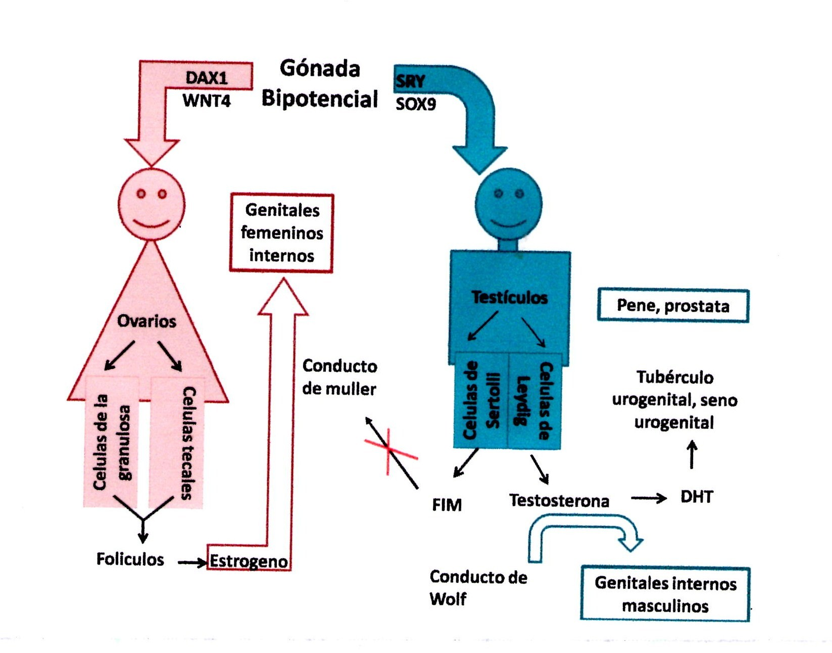 Muestra los genes y hormonas involucrados en el proceso de determinacion sexual en humanos